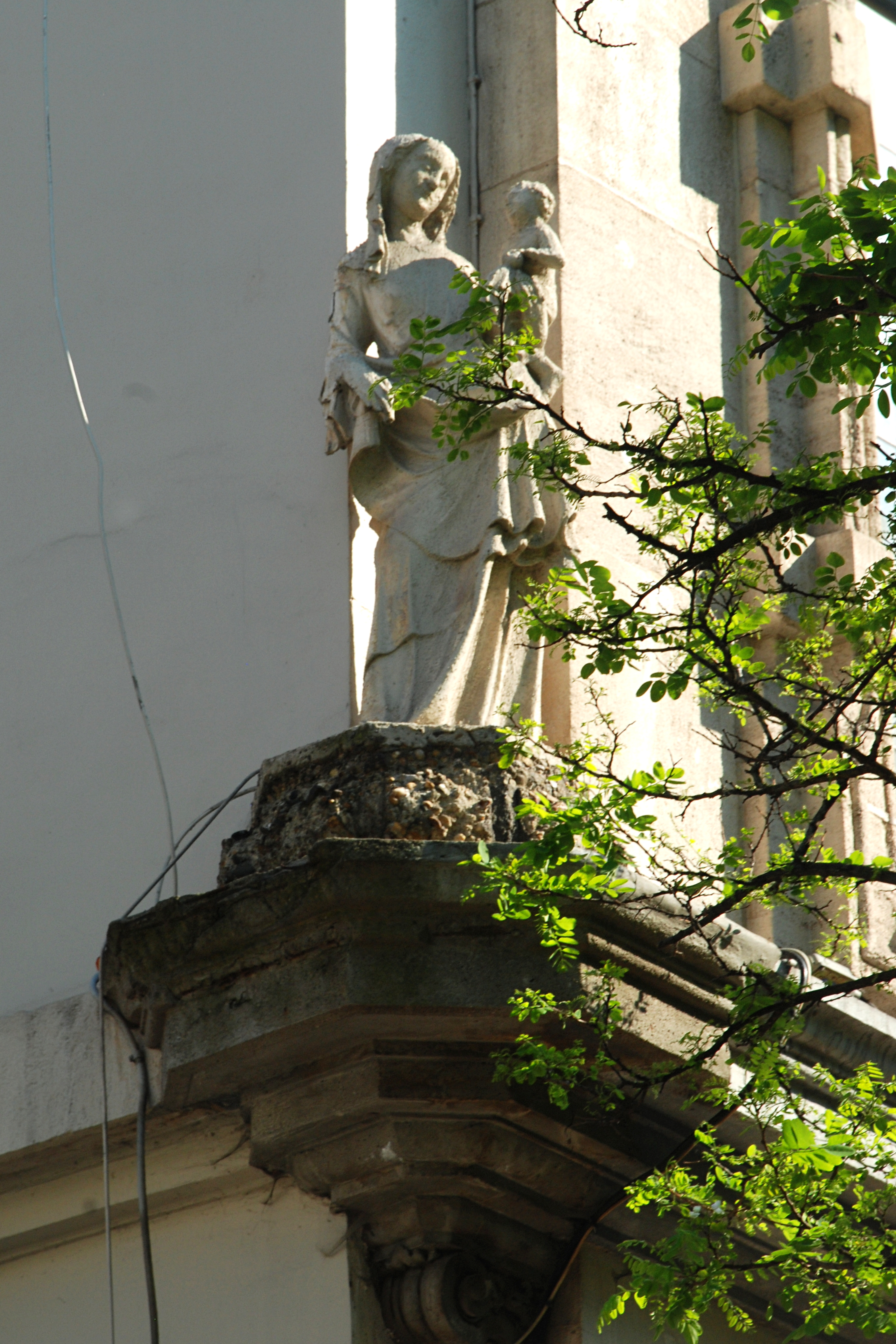 Belgique - Bruxelles - Maison presbytérale de l'église Notre-Dame du Finistère